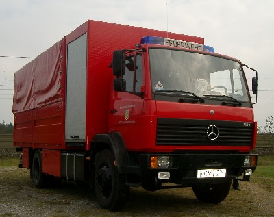 Schlauchwagen der FTZ Bad Gandersheim (SW 2000)